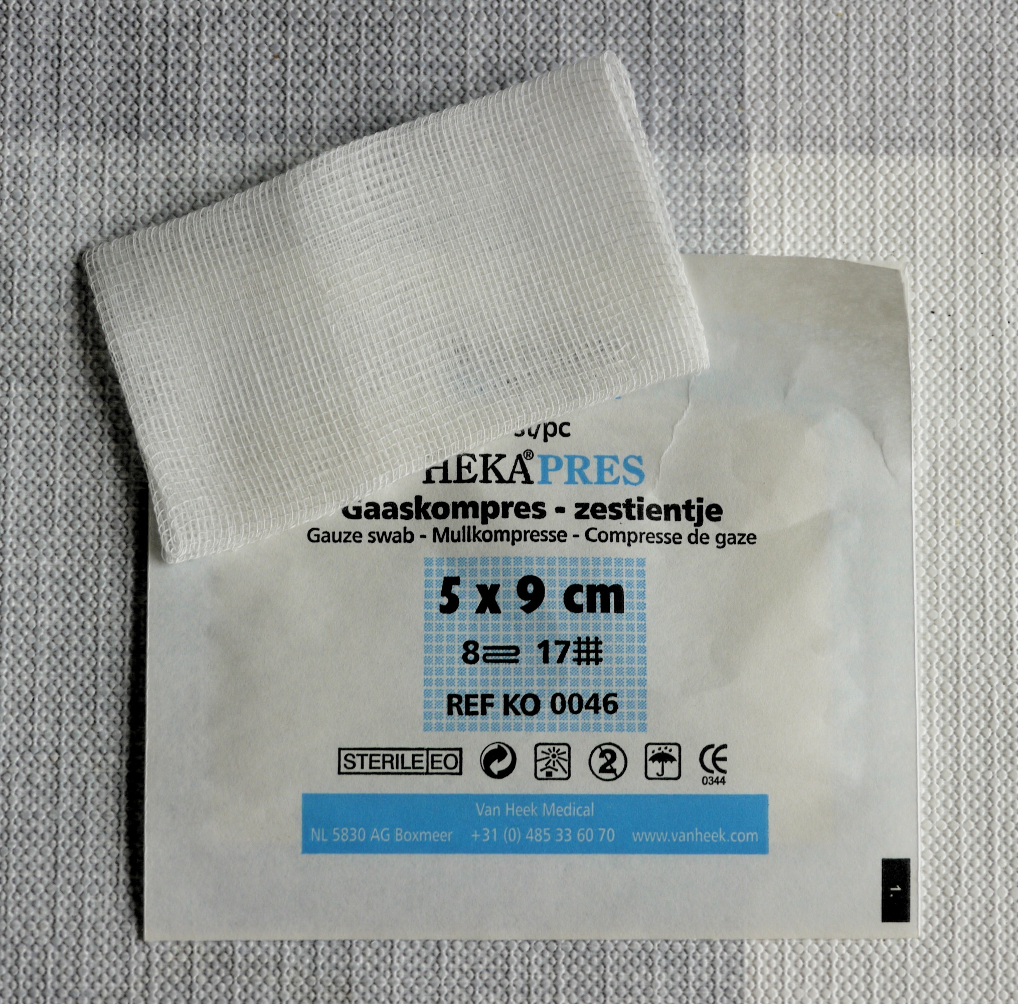 Een zestientje: verbandgaas, vervaardigd uit één zestiende vierkante meter steriel gaas.